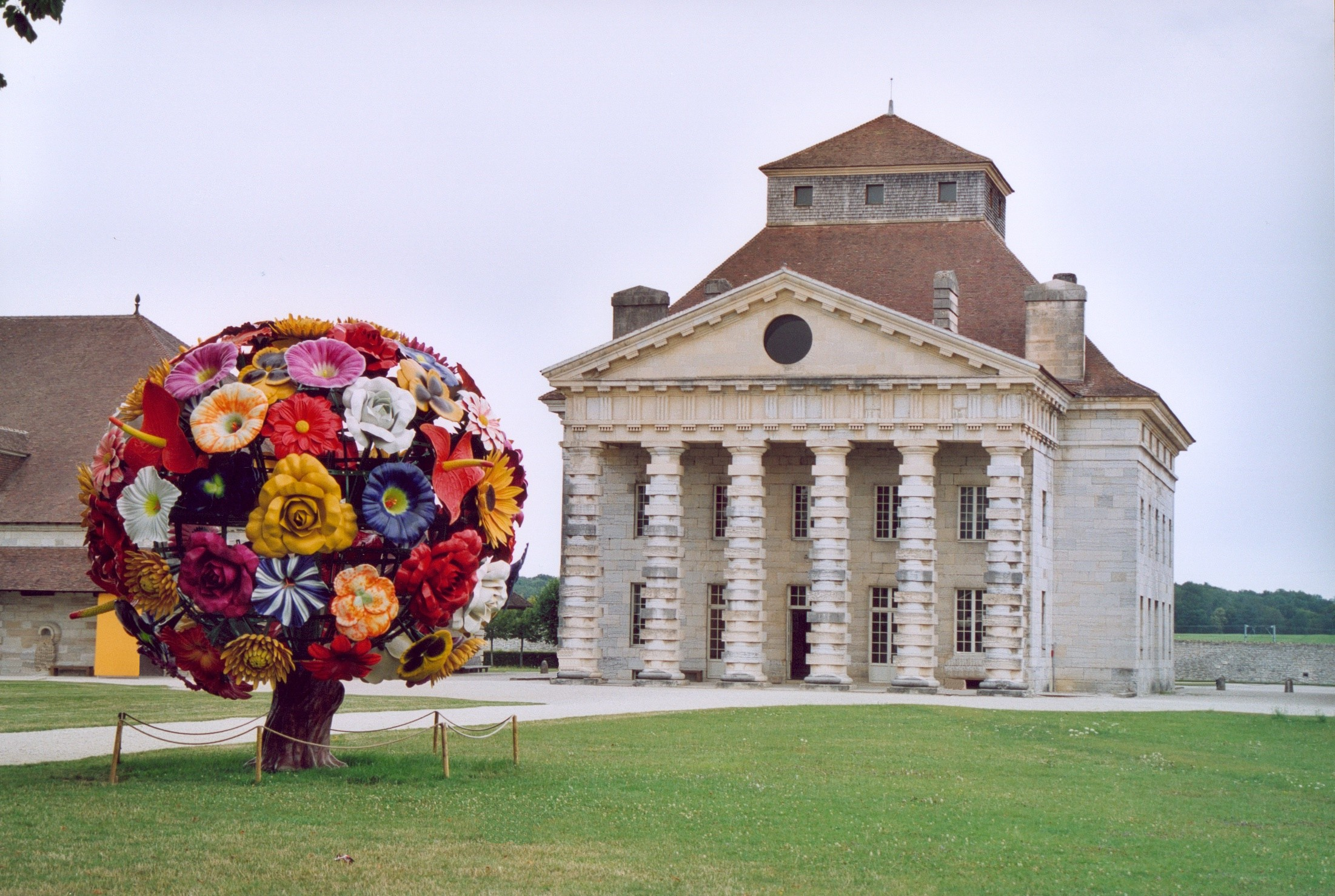 Arc-et-Senans Doubs France La saline royale Photographie prise par Patrick GIRAUD